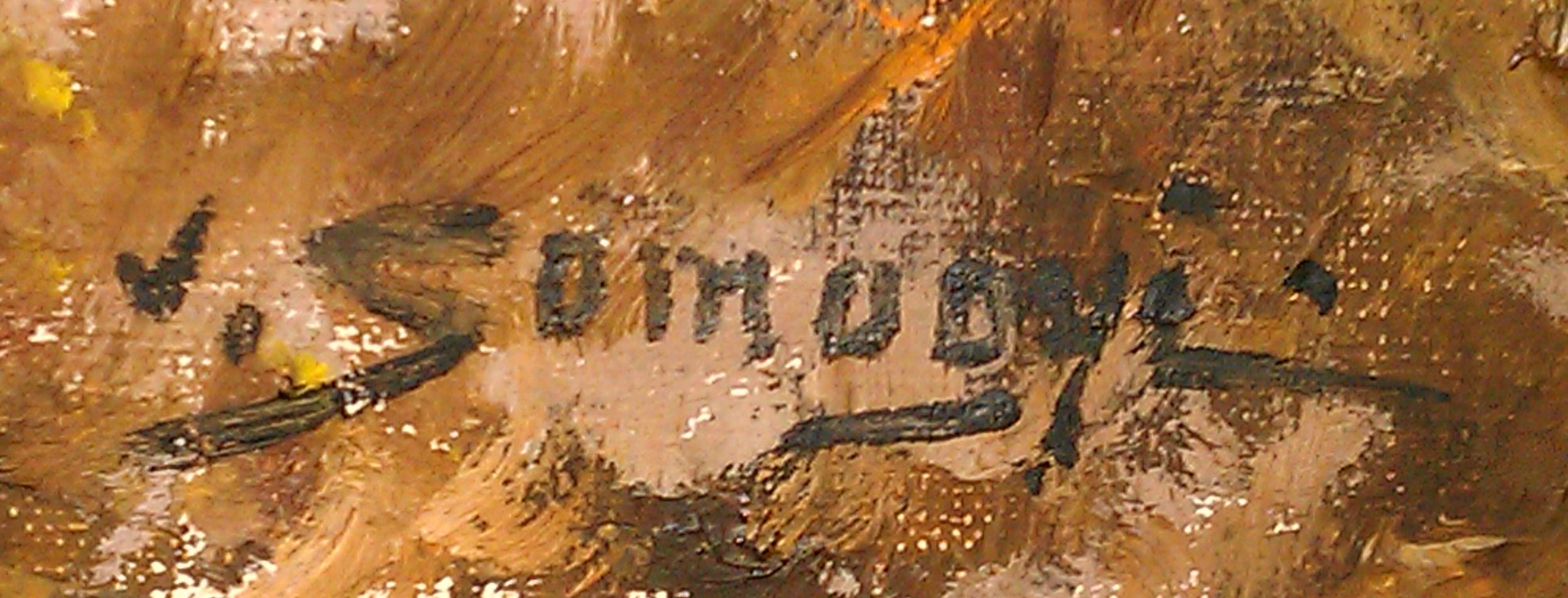 Unterschrift des Malers István von Somogyi unter einem Oelgemaelde